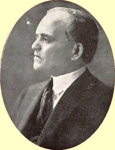 Conde Alessandro Siciliano (1860-1923)